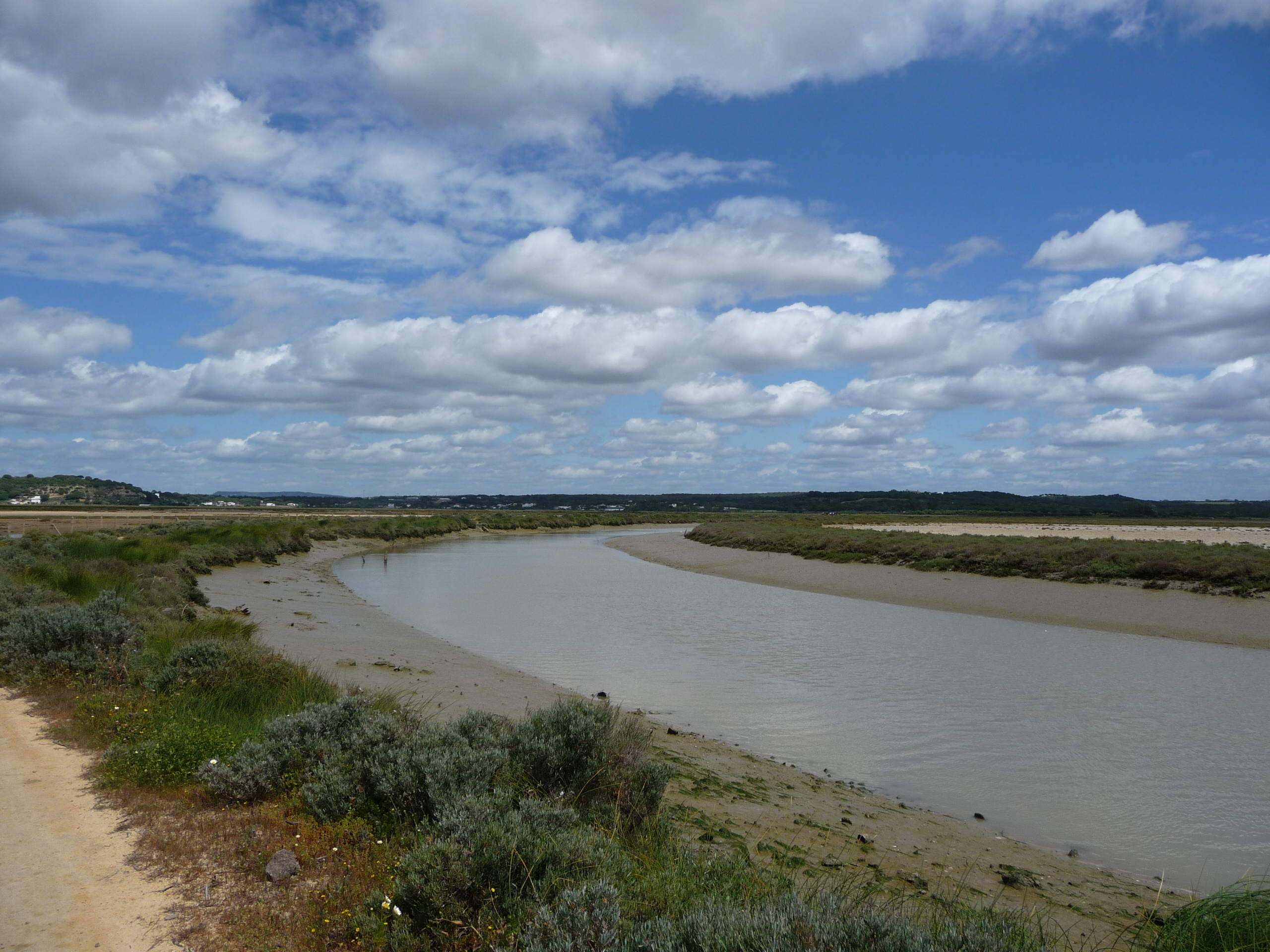 PNMarismasBarbate-p1020270.jpg